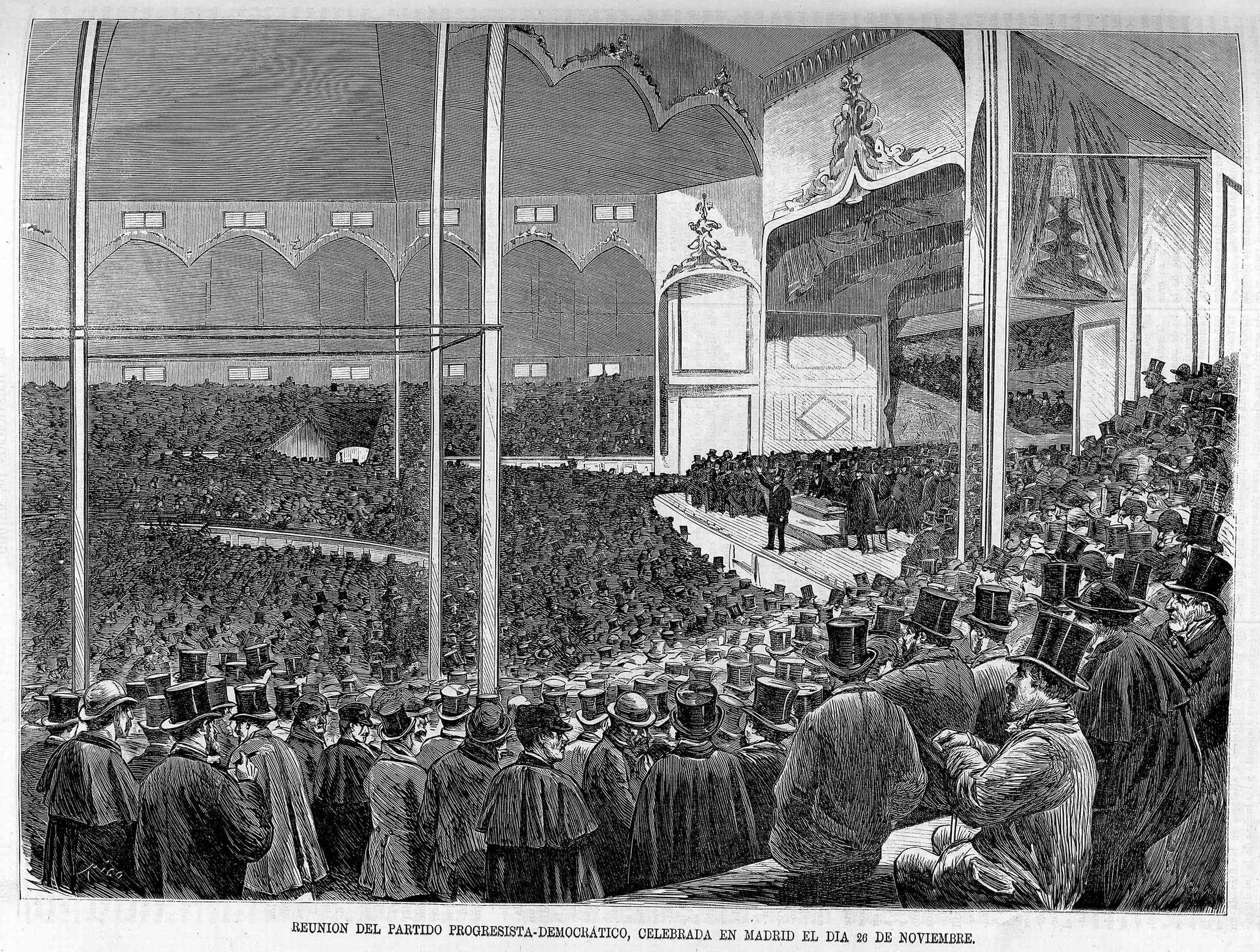 Reunión del partido progresista-democrático, celebrada en Madrid el día 26 de noviembre.